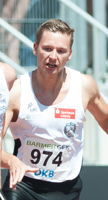 Deutsche Leichtathletik-Meisterschaften 2015: Männer 4x100m - Felix Göltl, Michael Pohl (LG OVAG Friedberg-Fauerbach), Robin Erewa, Alexander Kosenkow (TV Wattenscheid 01), Robert Hering, Roy Schmidt (SC DHfK Leipzig)